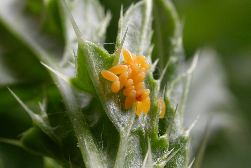 7 spot ladybird eggs